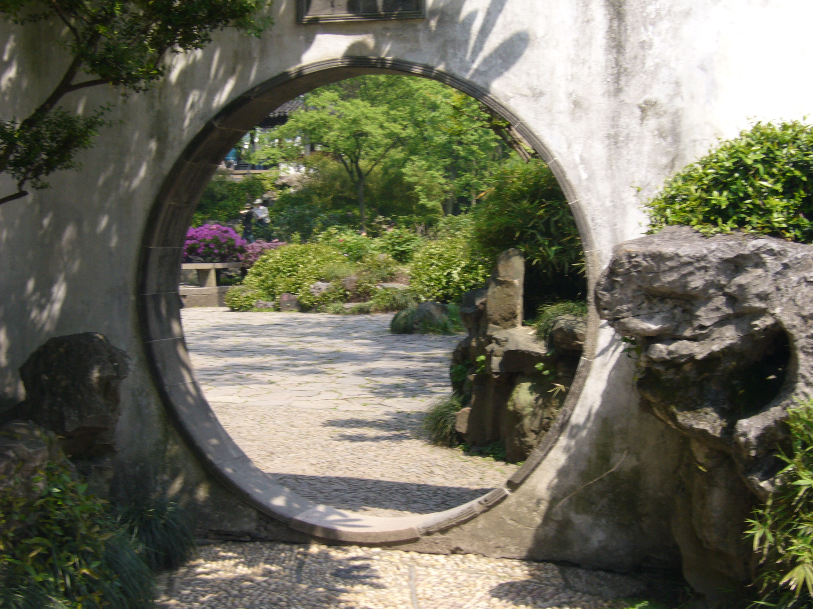 Moon gate in classical Chinese garden Suzhou Garden Museum, Doorkijkje.